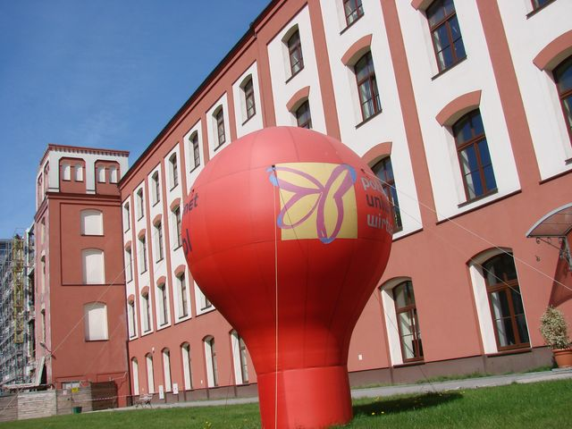 Główna siedziba PUW w Łodzi